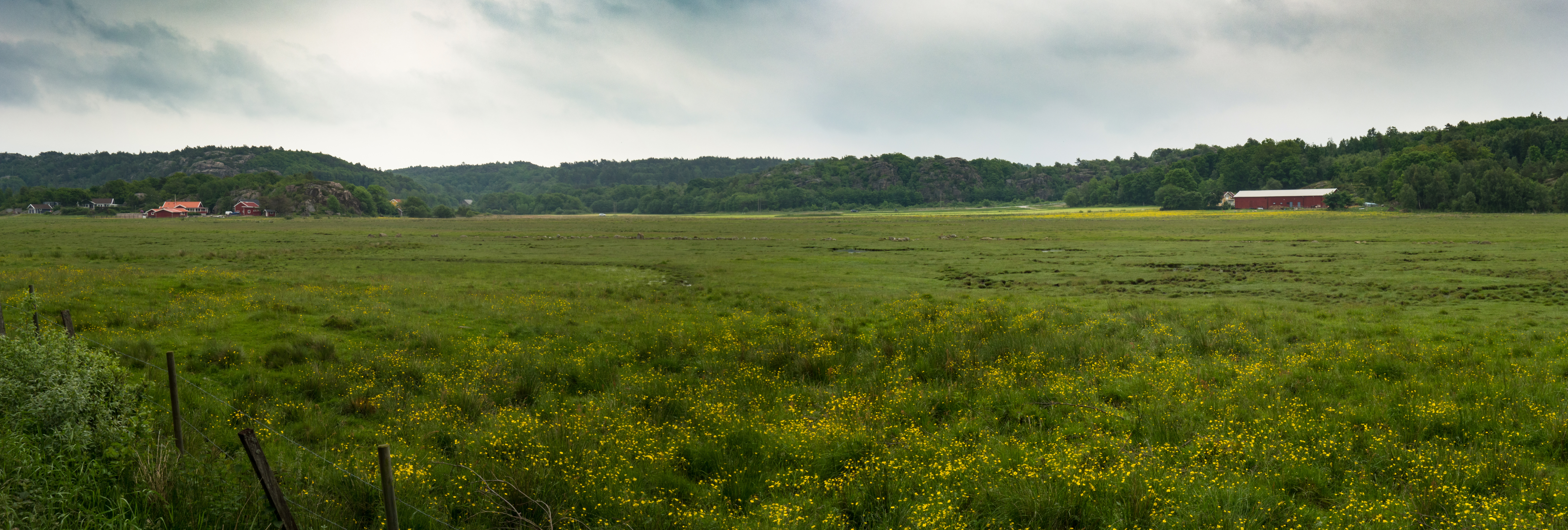 Norra delen av strandängarna vid Trälebergskile, Lysekils kommun, Sverige.